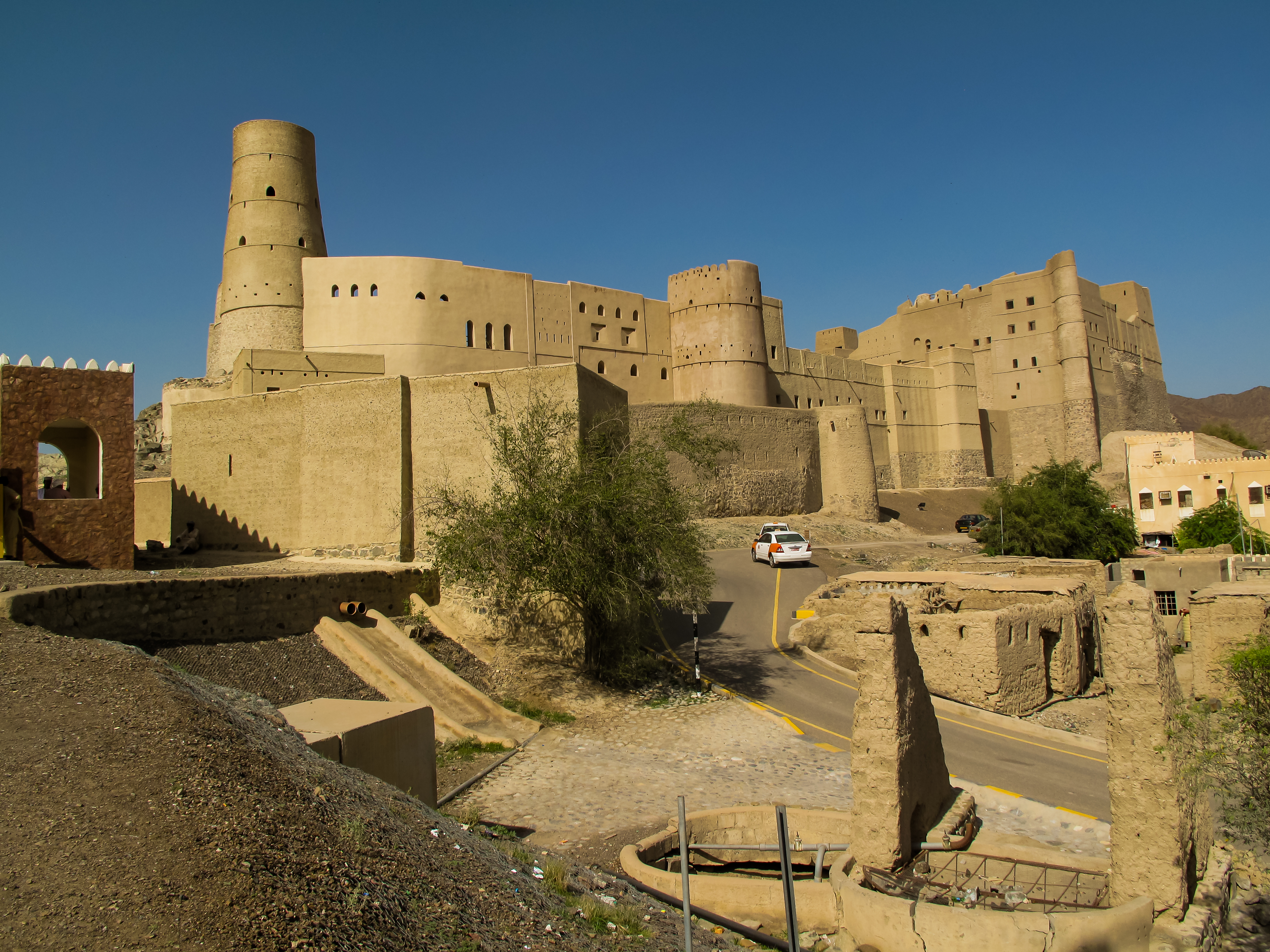 Pevnost Bahla v Ománu